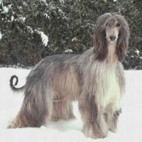 Lévrier afghan mâle Quad El Dooraunee